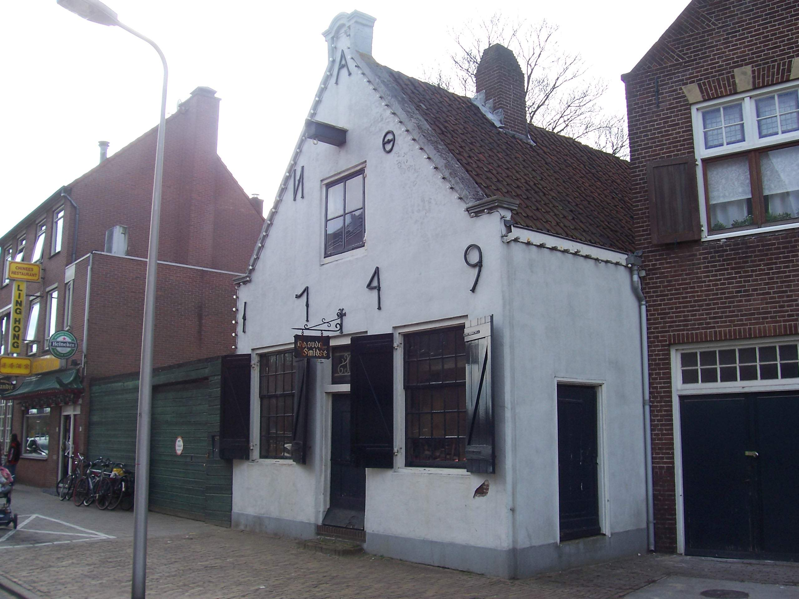 De Oude Smidse, 1749, tot 2019 het enige gemeentelijke monument in Diemen.